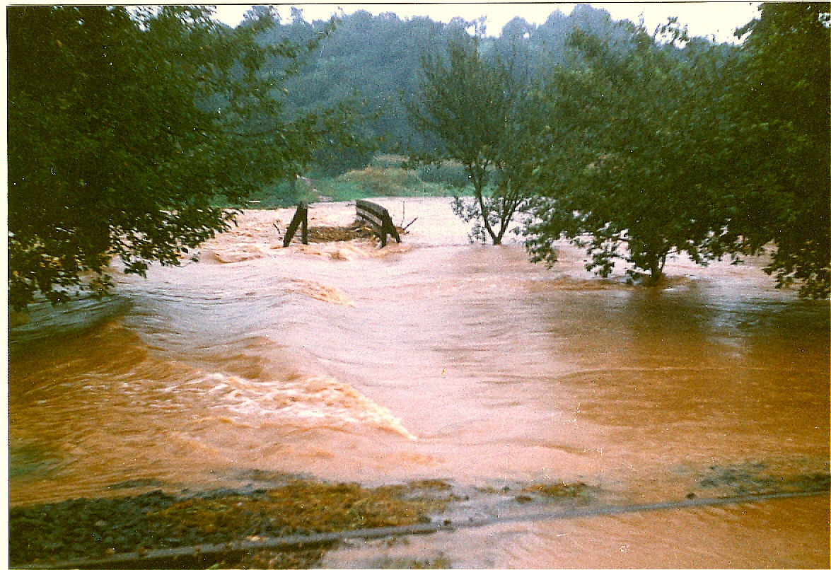 Das schwere Kahlhochwasser im August 1981 in Kälberau